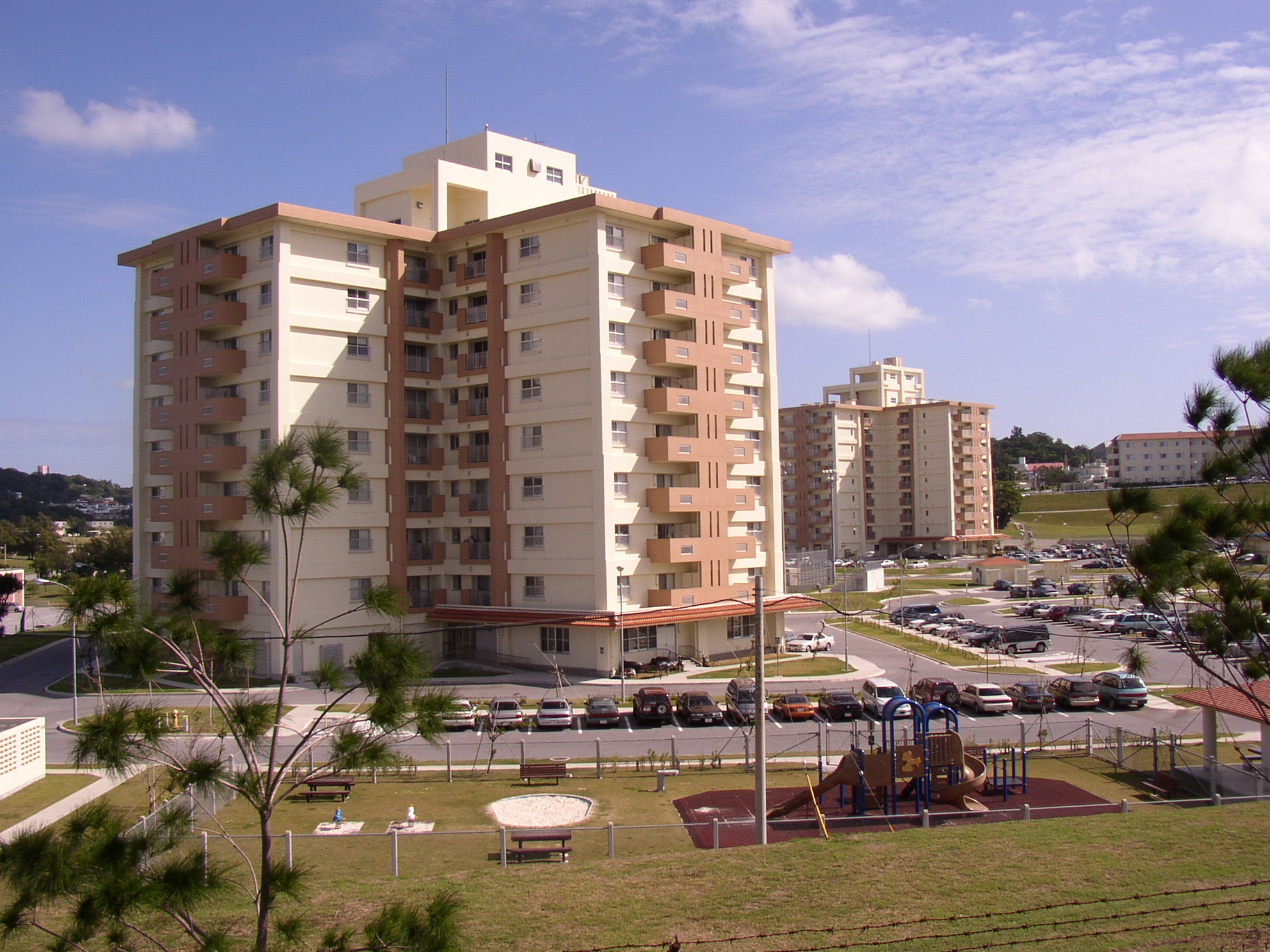 camp foster housing